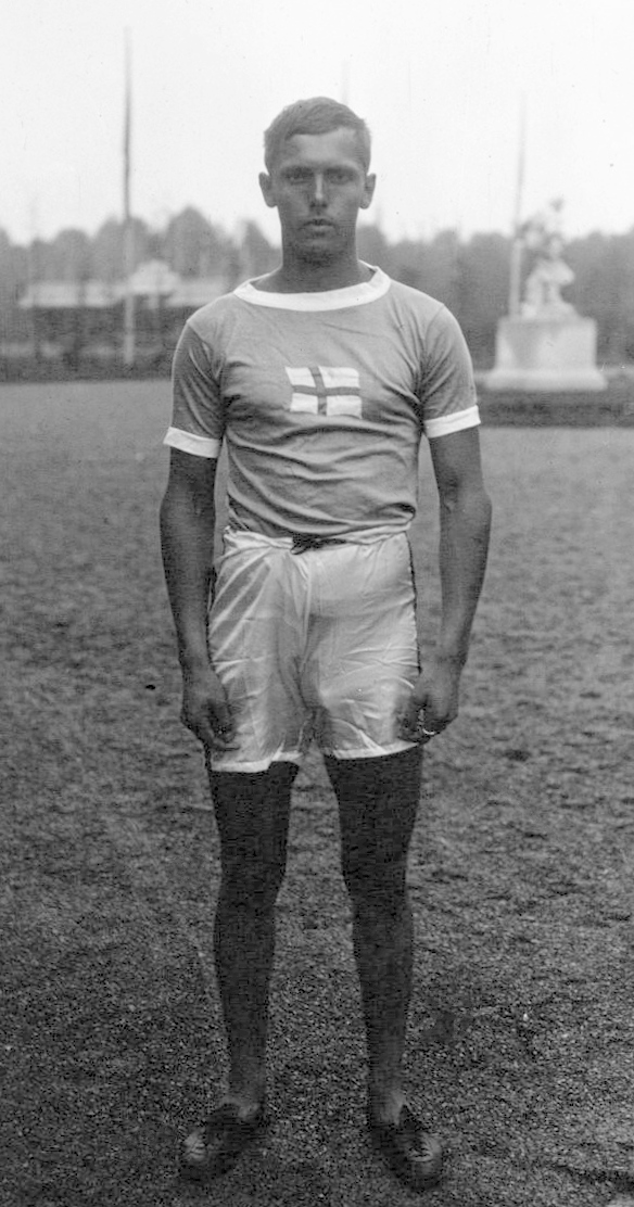 VIIes Olympiades à Anvers : Lethonen, gagnant du pentathlon : [photographie de presse] / Agence Meurisse